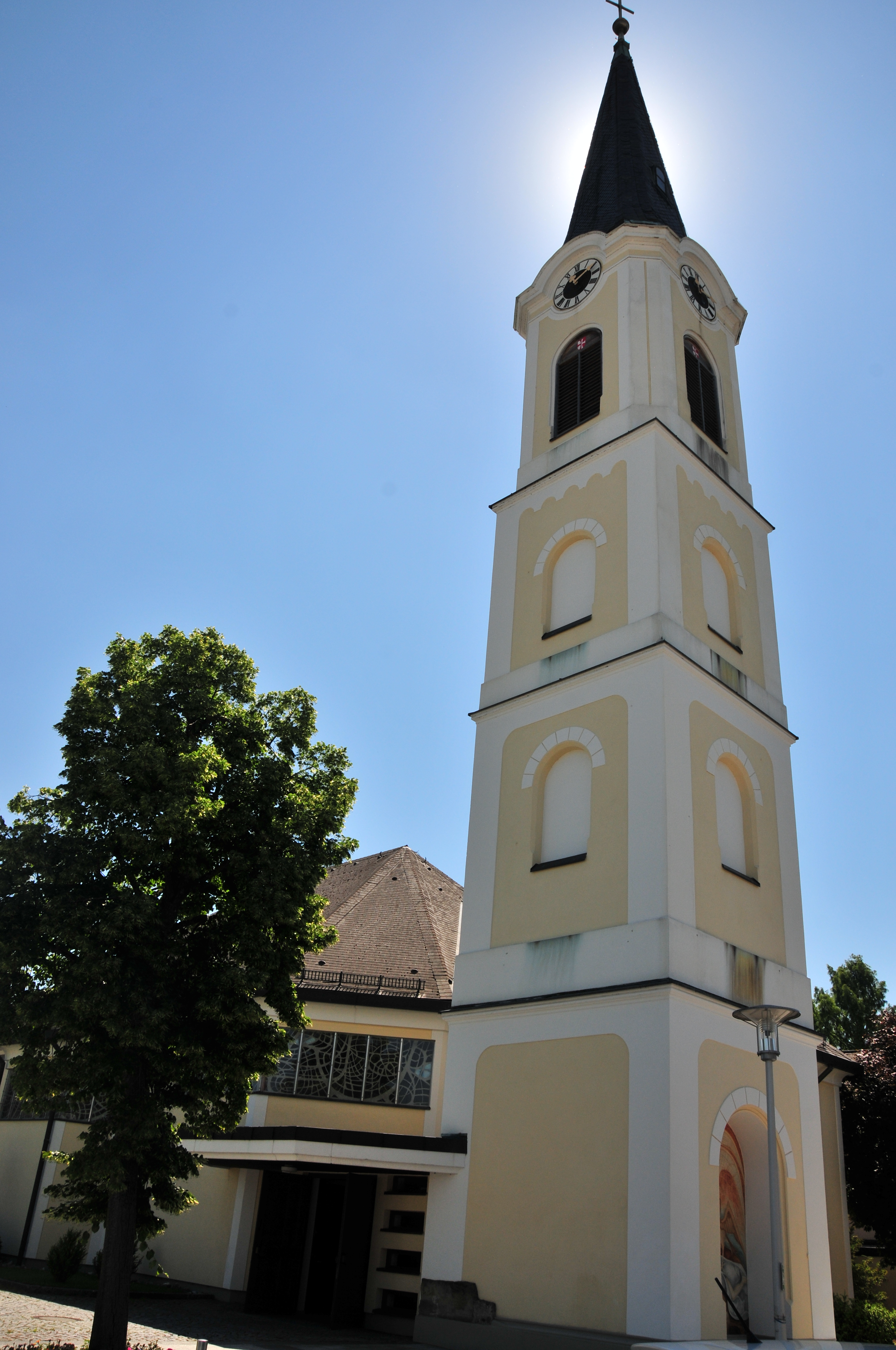 Kath. Pfarrkirche hl. Florian und ehem. Friedhof